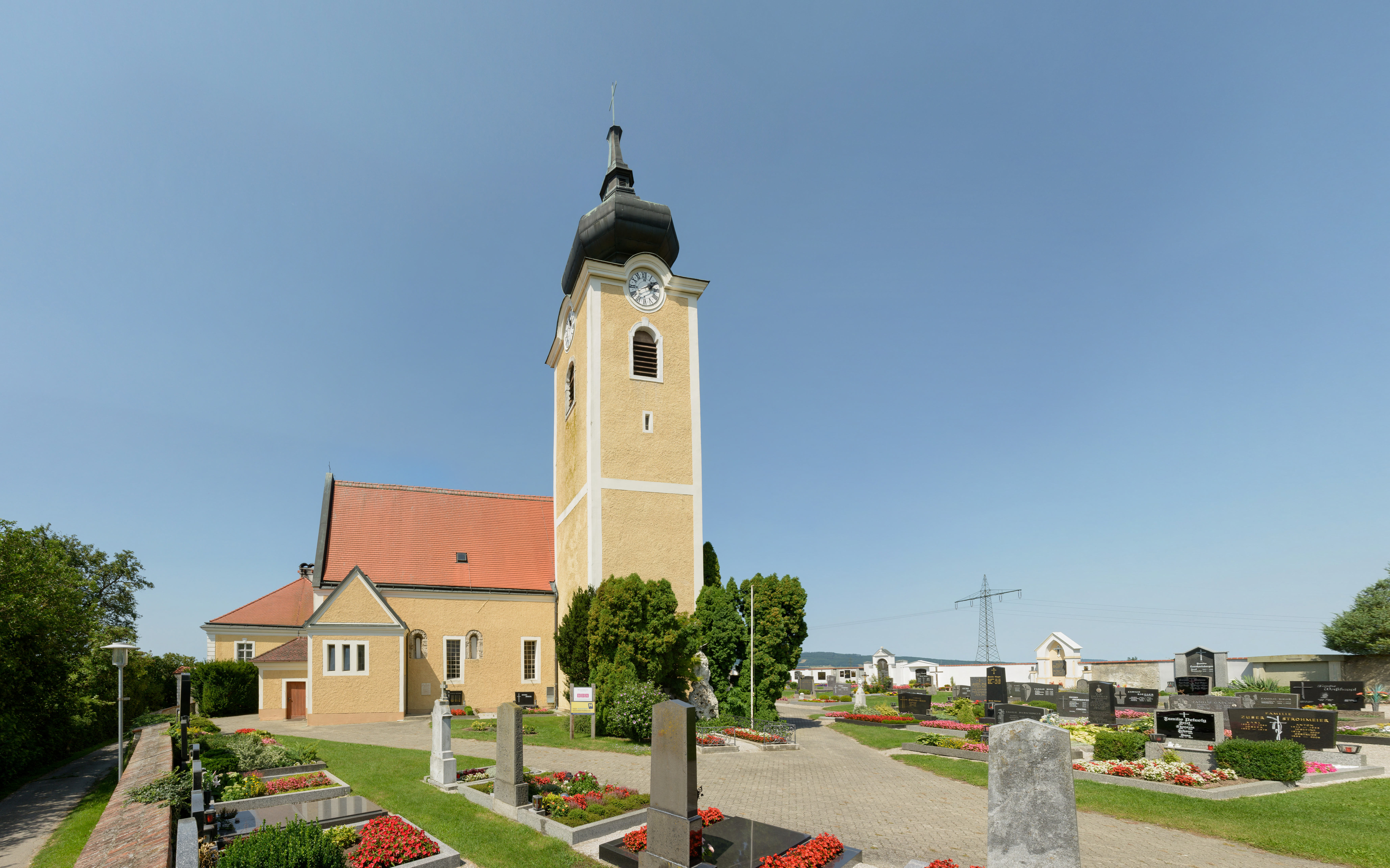 Kath. Pfarrkirche hll. Petrus und Paulus und Friedhof